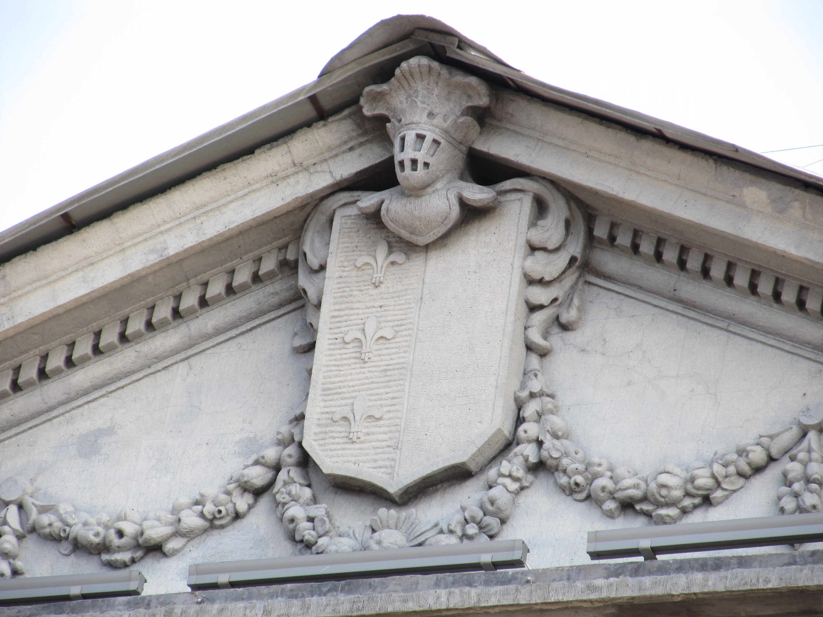 Домовладение Тенишевых, Санкт-Петербург, Английская наб., 14/Галерная ул., 13